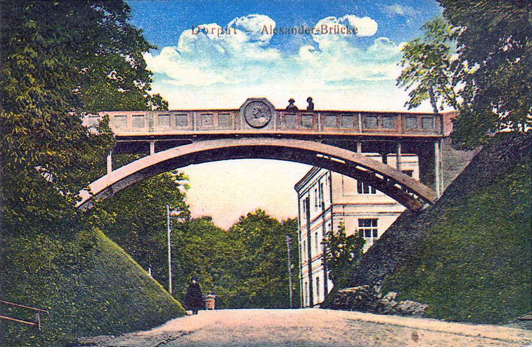 Kuradisild